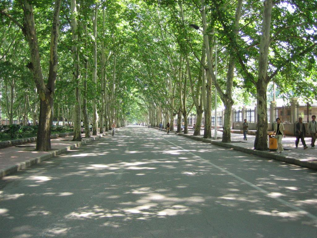 中文（中国大陆）: 美丽的西苑路